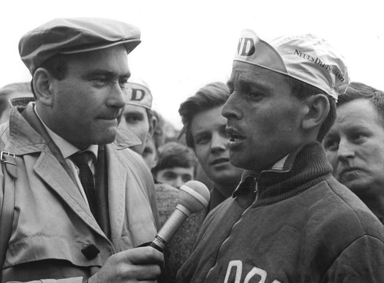 Zentralbild/Liebers 19.5.1967 Gera: XX. Internationale Friedensfahrt. 10. Etappe Halle-Gera über 112 km am 18.5.1967. Günter Hoffmann (DDR, rechts) wird nach dem Rennen von Fernsehreporter Heinz Florian Oertel interviewt. Der DDR-Fahrer erspurtete sich im Geraer Stadion der Freundschaft den dritten Platz - die großen Anstrengungen dieser schweren Etappe sind noch auf seinem Gesicht gezeichnet.